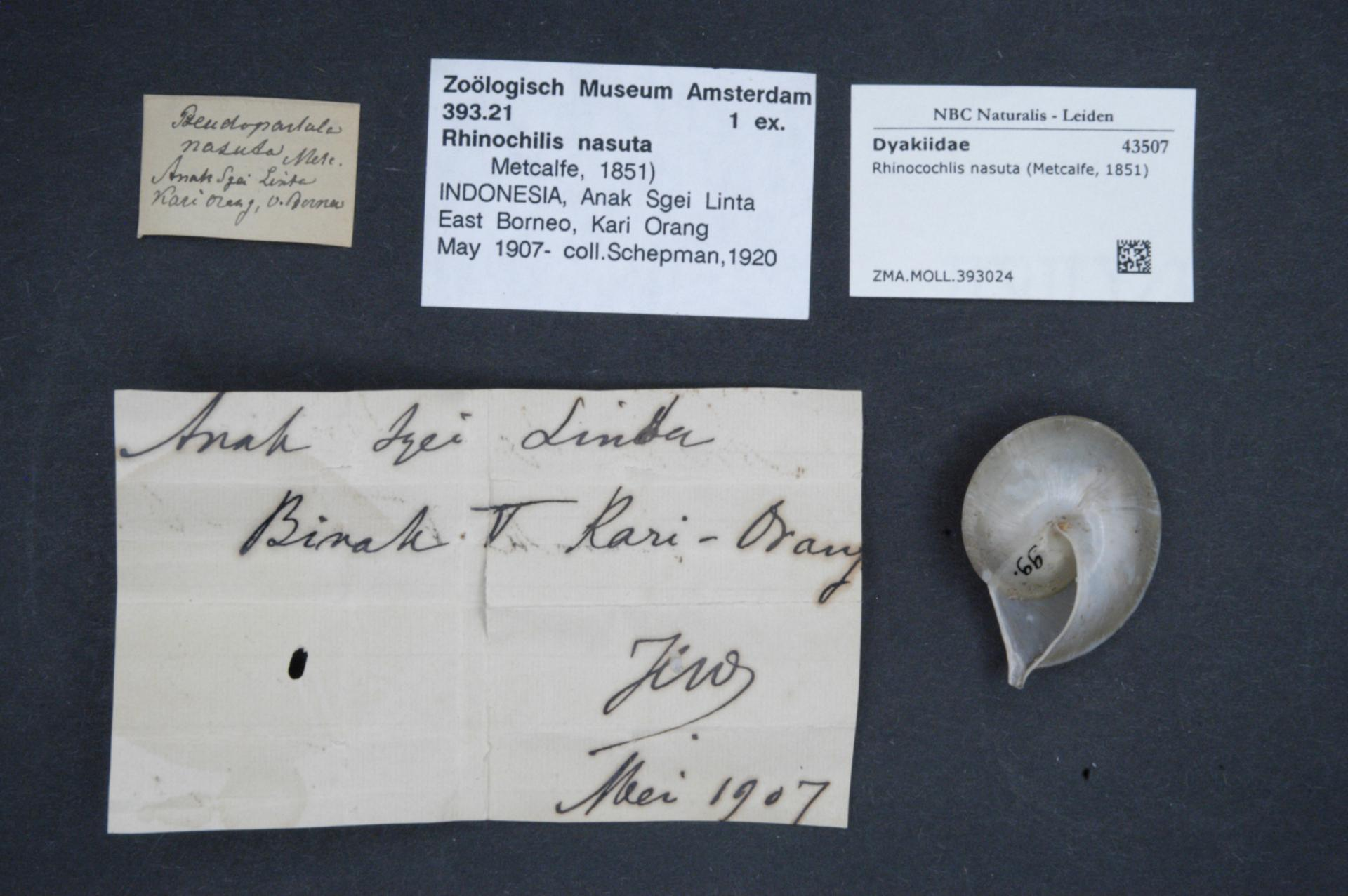 Rhinocochlis nasuta (Metcalfe, 1851)